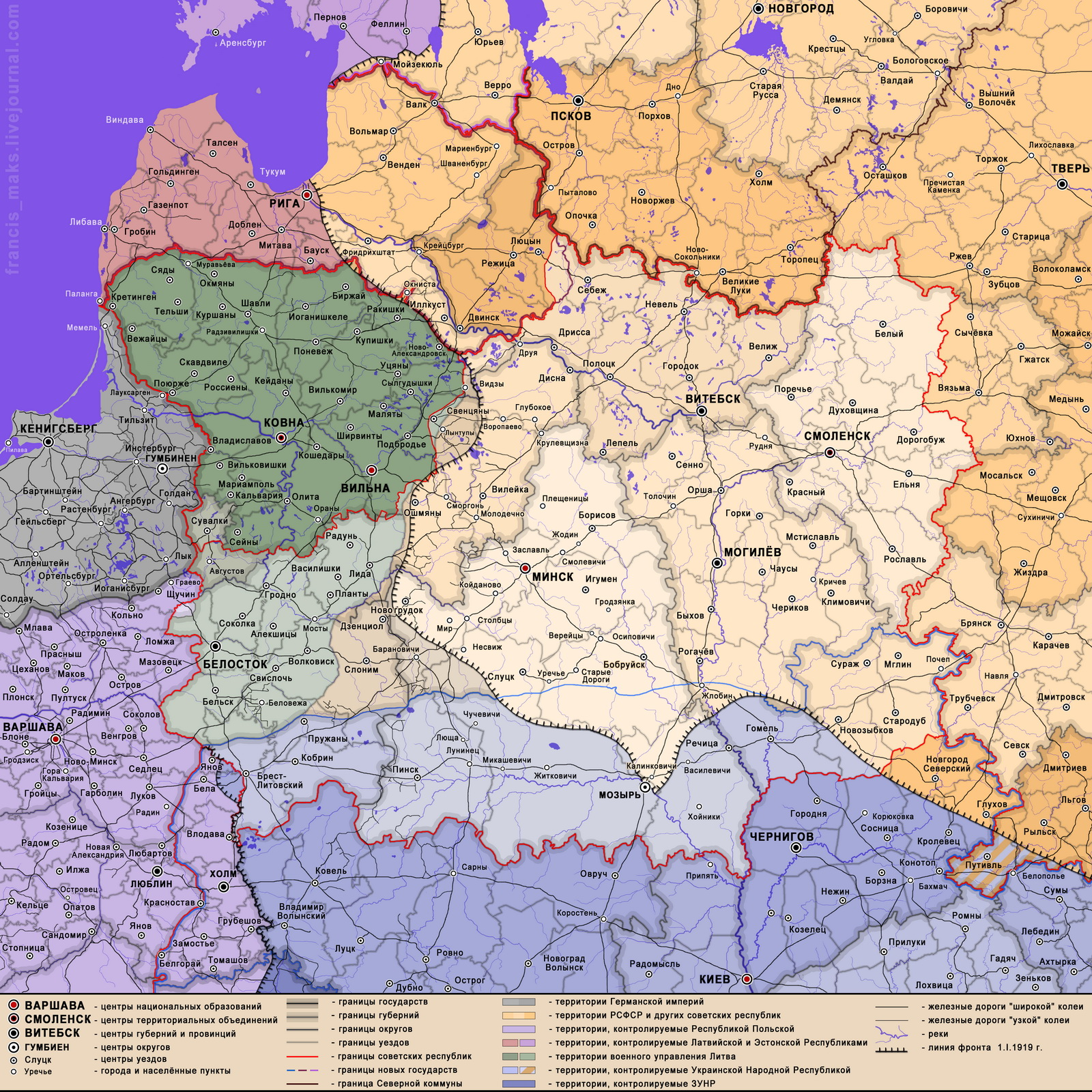 Абвяшчэнне Савецкай Сацыялістычнай Рэспублікі Беларусі 1 студзеня 1919